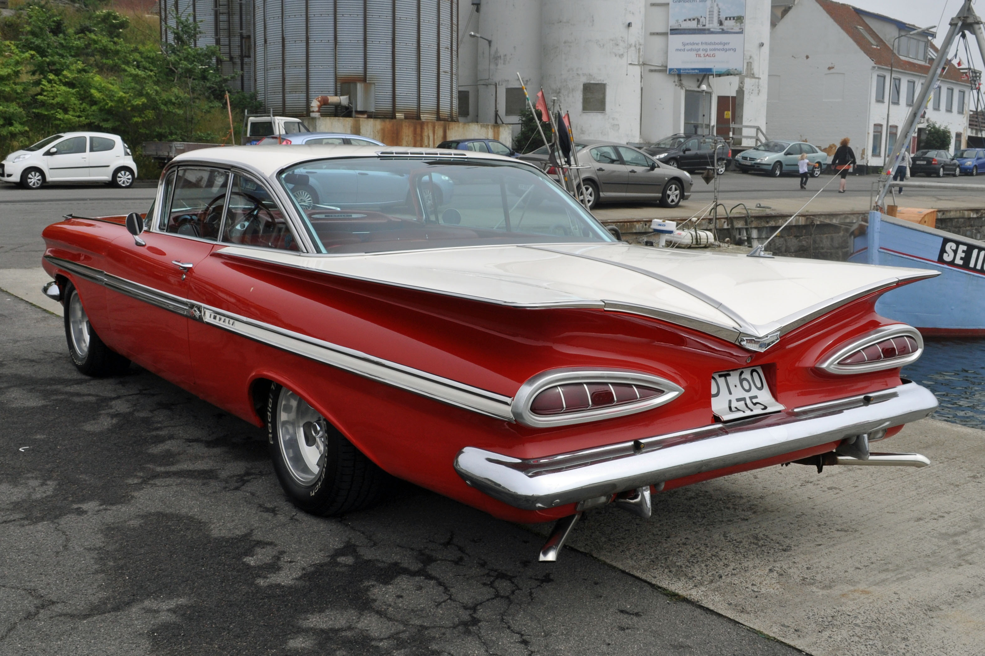 Chevrolet Impala, in Hasle, Bornholm (2012-07-08), by Klugschnacker in Wikipedia (4)